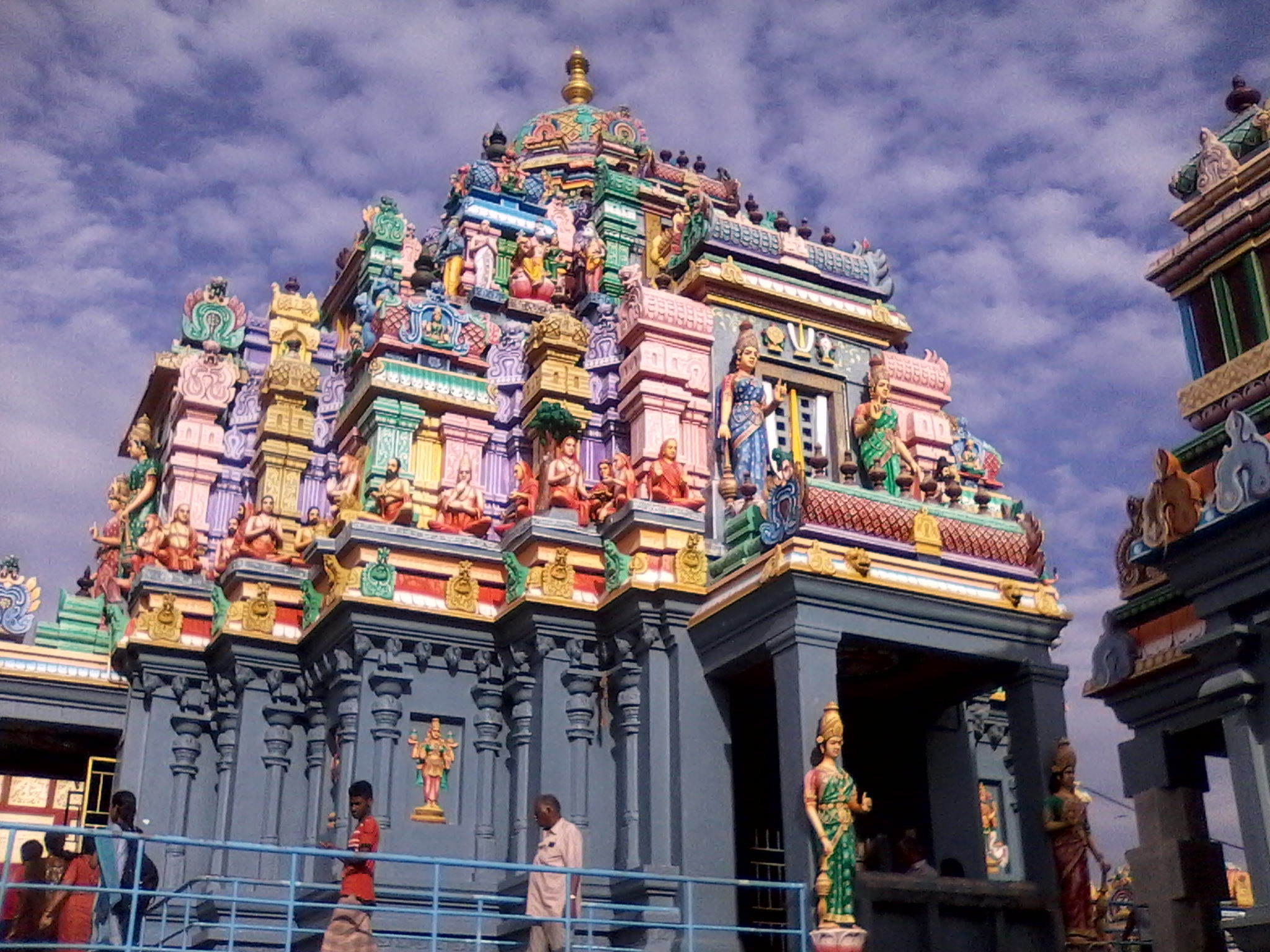 At Besant nagar beach, Chennai